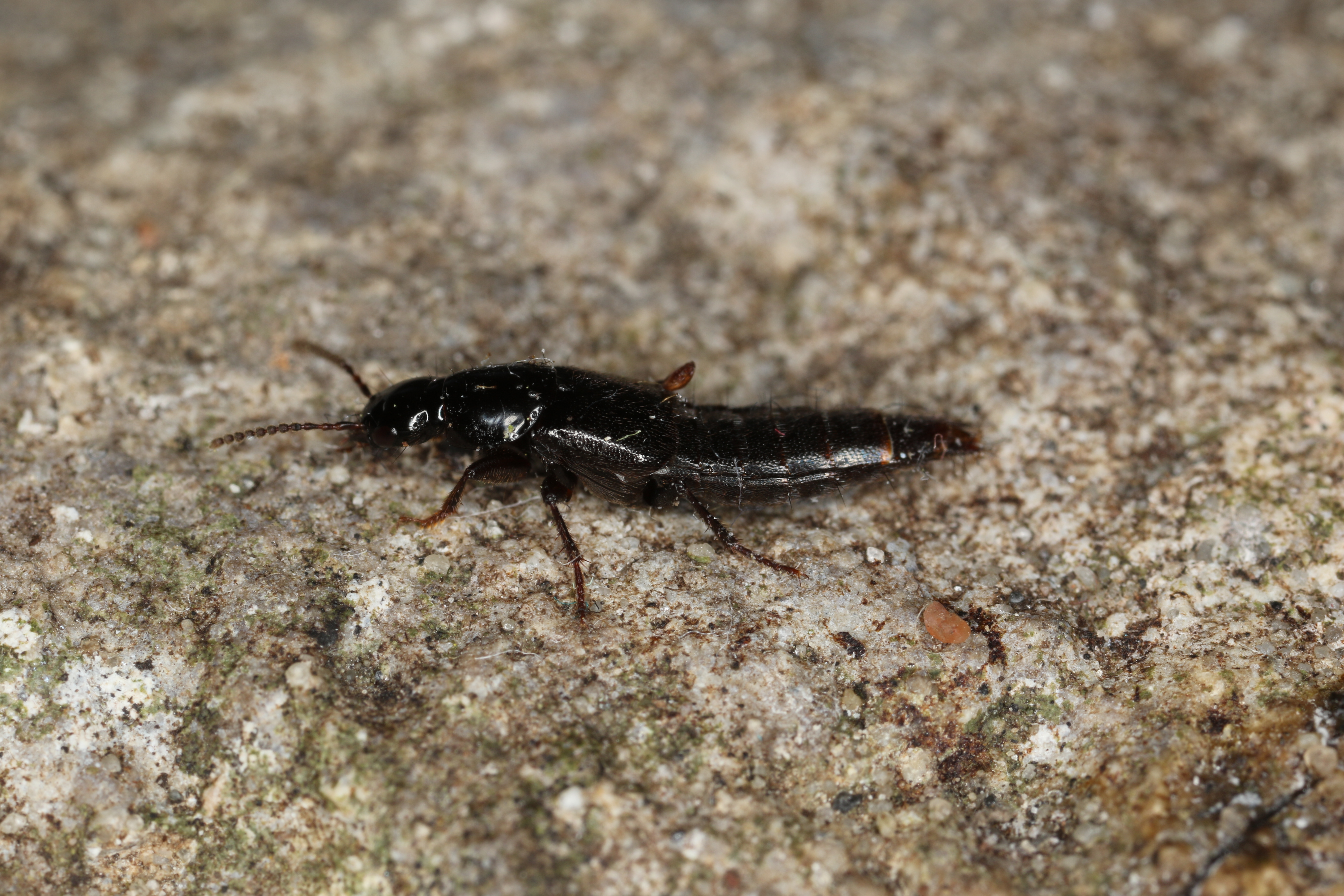 Quedius mesomelinus (Marsham, 1802), Søborg, Denmark, 6 May 2016